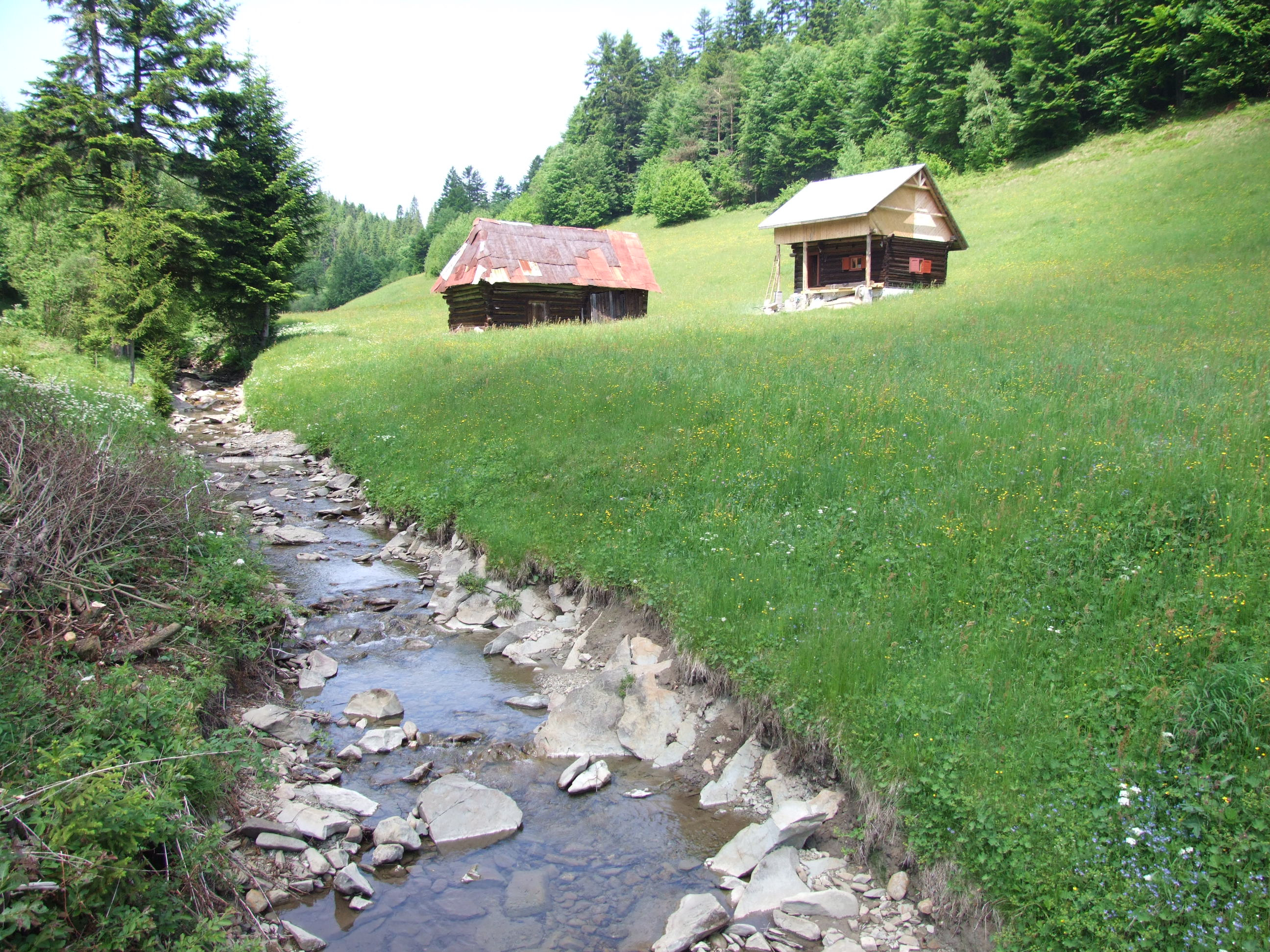 Potok Wielki Lipnik w Limanowej. Obok parking i początek drogi krzyżowej do Sanktuarium Matki Boskiej Litmanowskiej